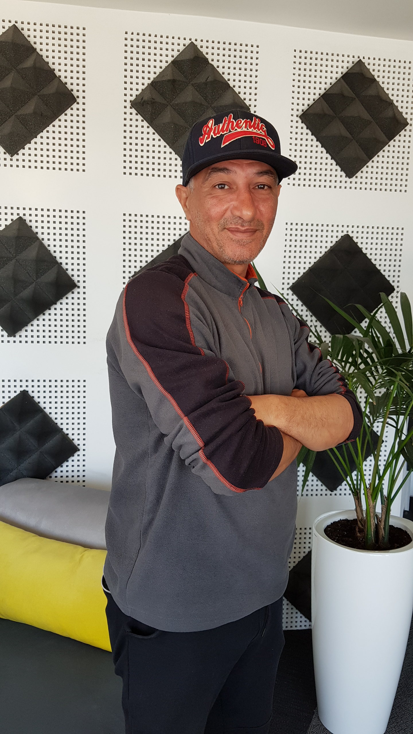 L'ex joueur international Hababi El Arabi désormais consultant radio dans l'émission Oulemaa de Mars diffusée sur RADIOMARS du lundi au vendredi à 10h30